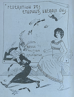 carricature Etudiants Libéraux de Liége